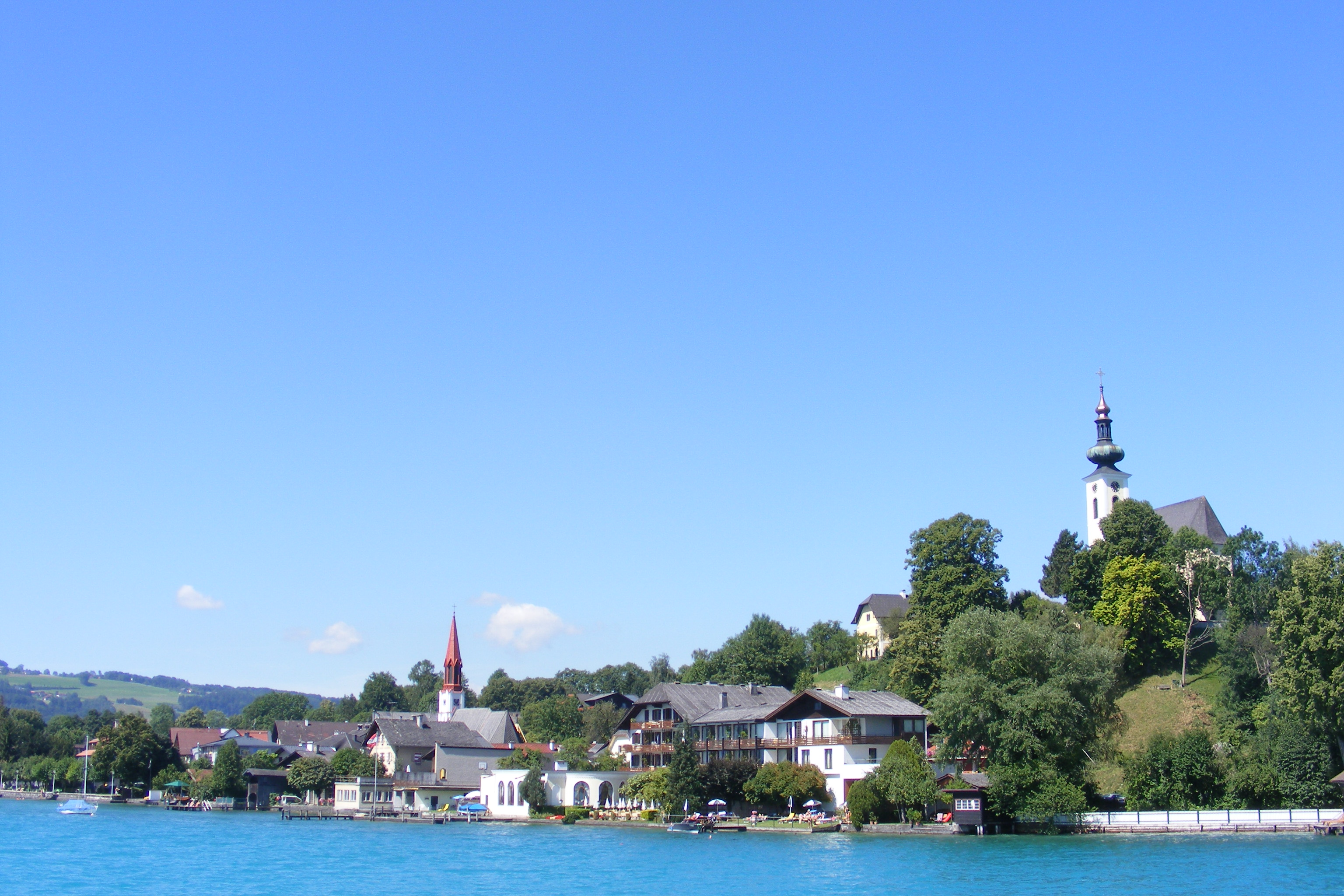 Ort Attersee am Attersee, Oberösterreich